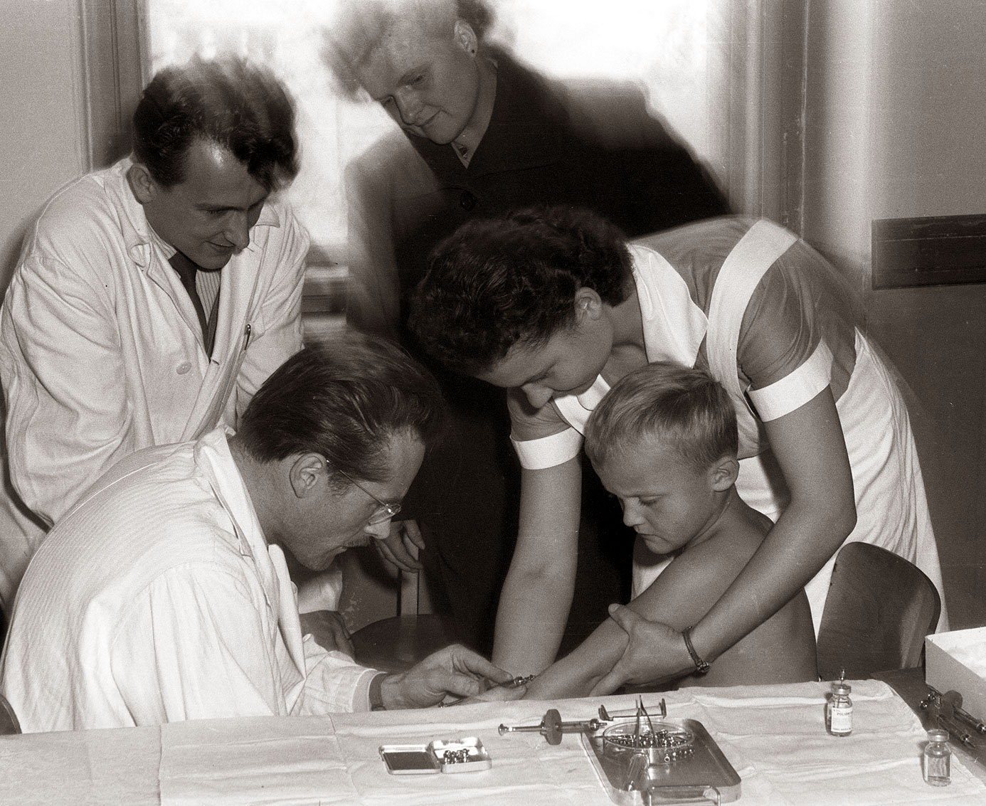 Cepljenje proti otroški paralizi v Mariboru